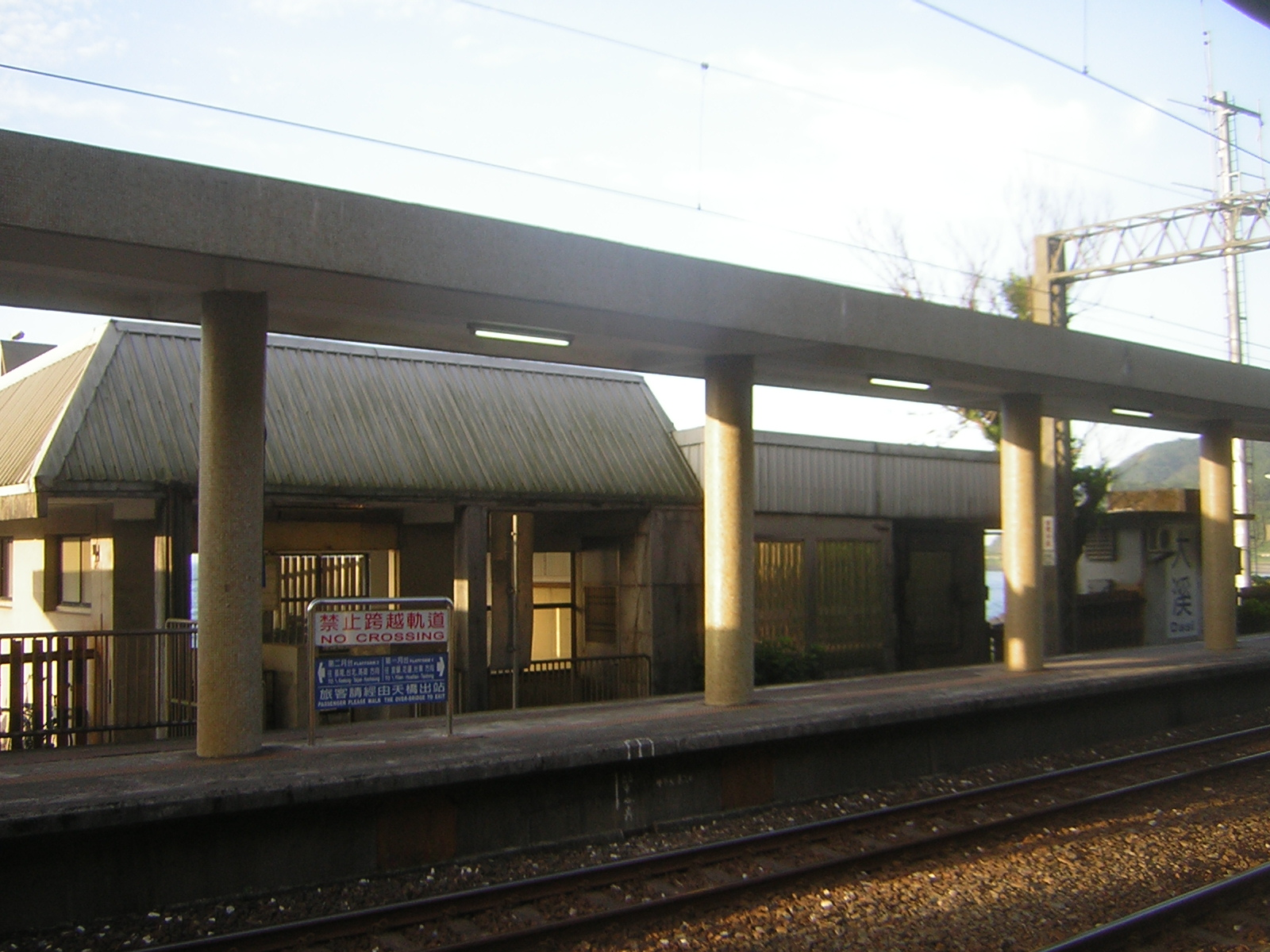 Inside view of Dasi Station of Taiwan Railway Administration.